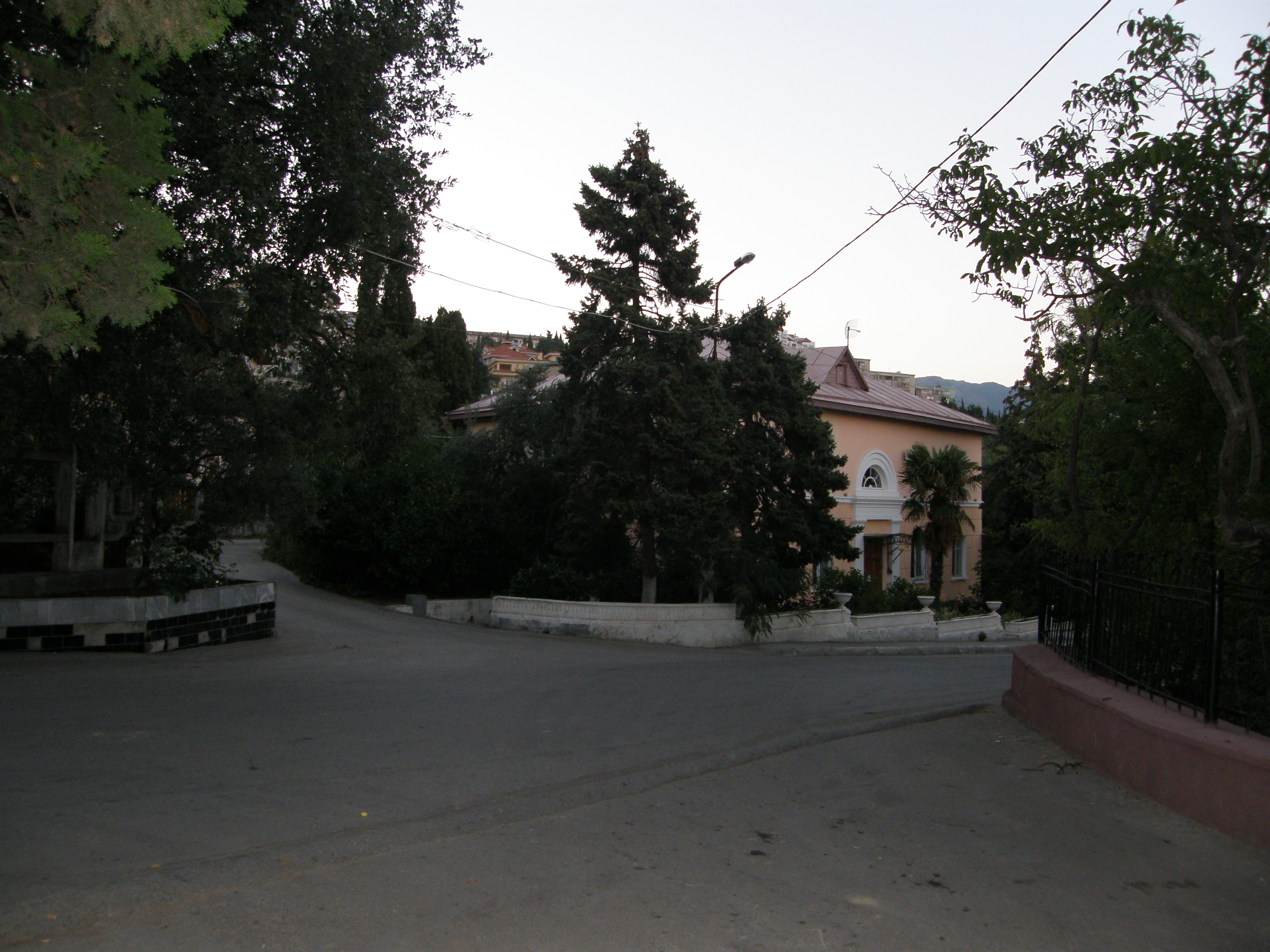 Административное здание винодельческого предприятия «Ливадия» (ГП «Ливадия»), входящего в состав ГК НПАО «Массандра»